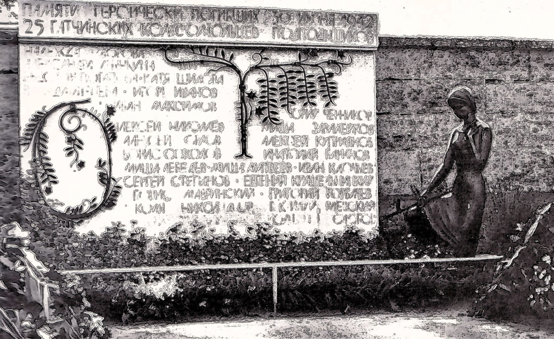 Памятник комсомольцам-подпольщикам в парке Сильвия в 1980-е годы, рисунок